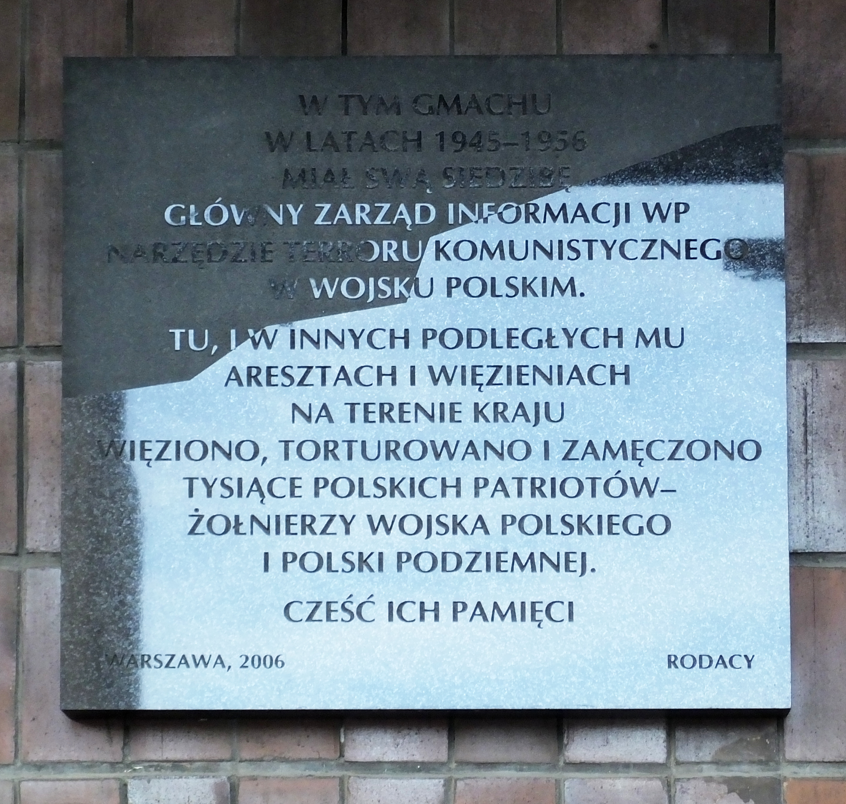 Jedna z tablic opisujących historię gmachu wojskowego na rogu ul. Oczki i Chałubińskiego w Warszawie